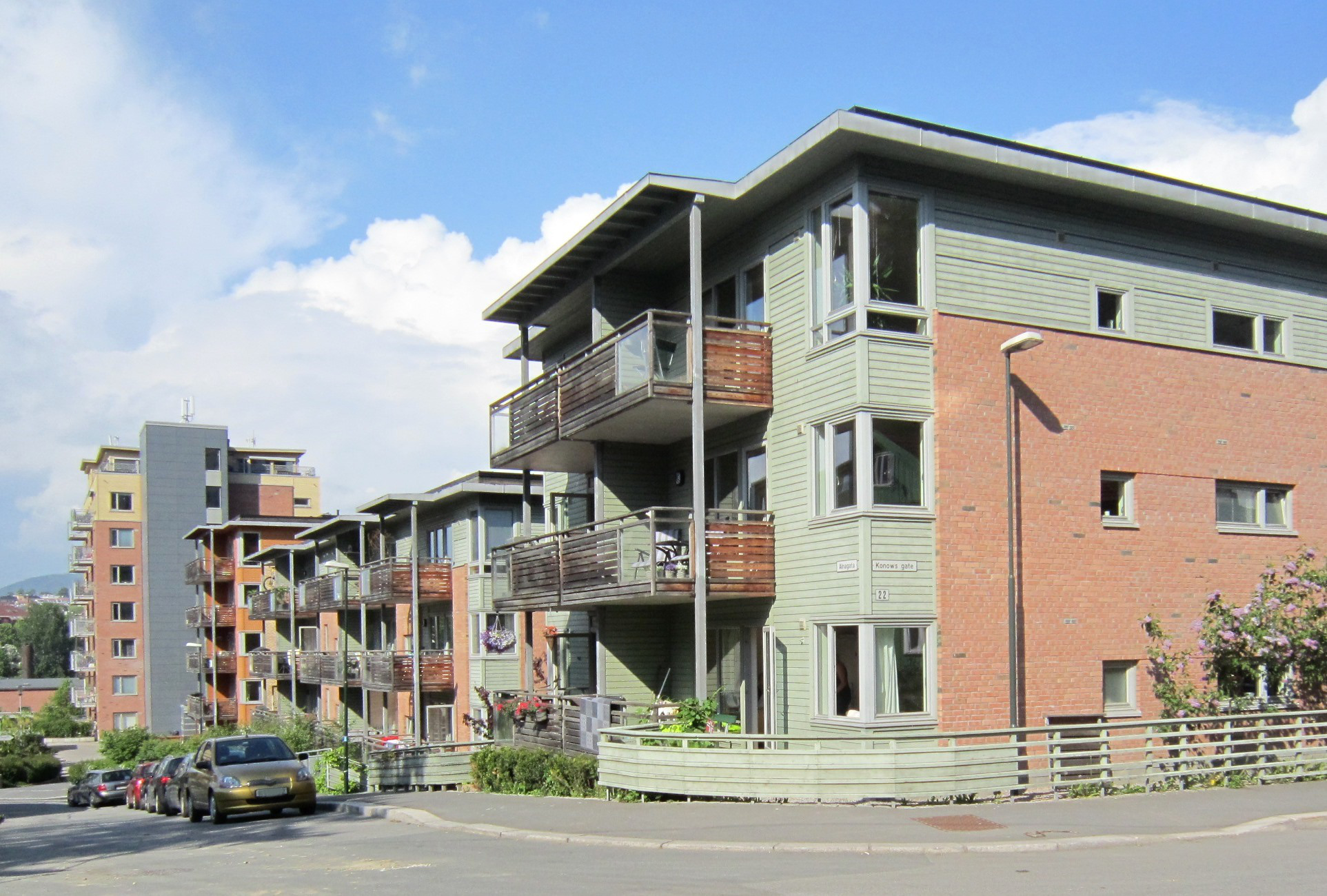 Arctanders gate i Gamlebyen i Oslo